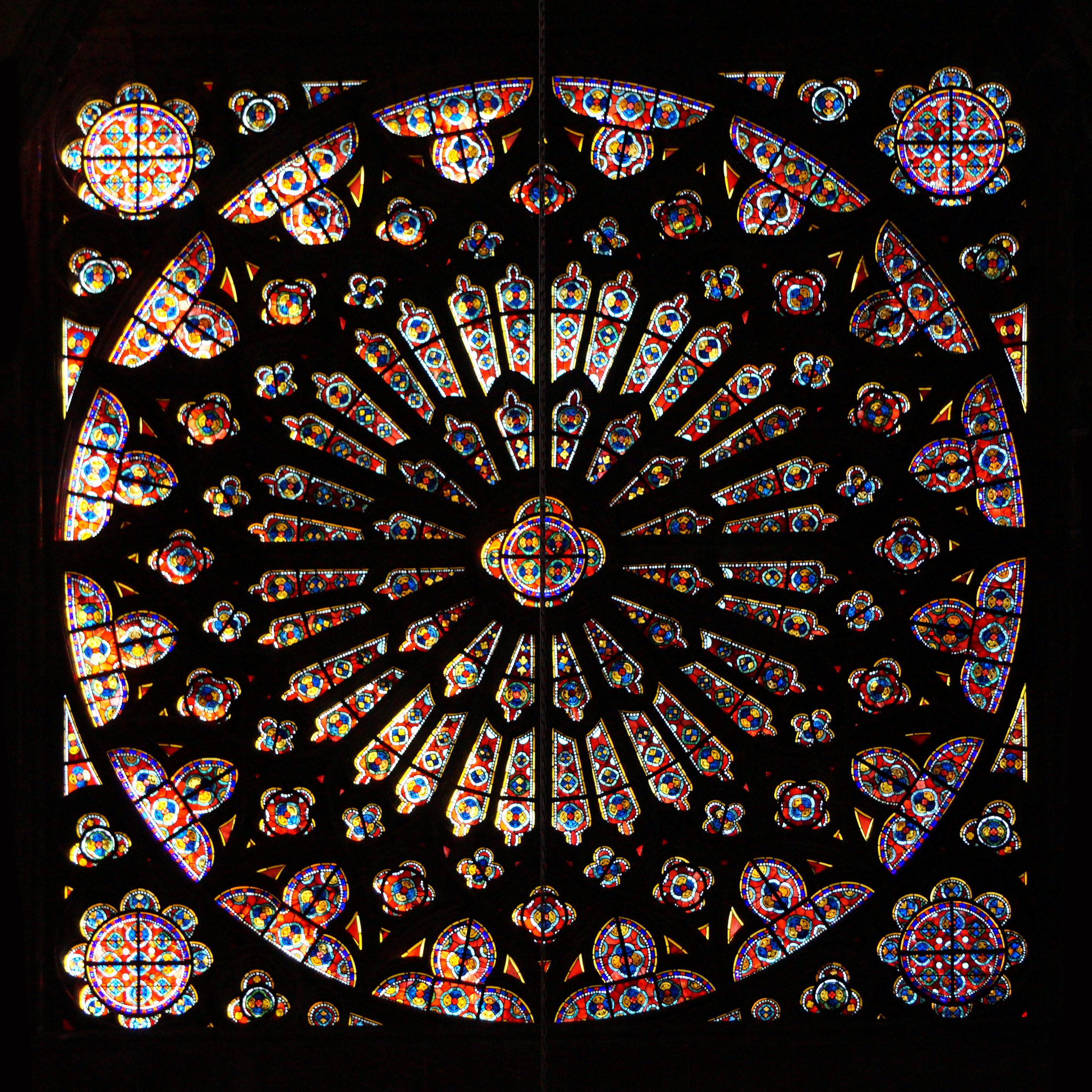 Clermont-Ferrand (Puy-de-Dôme, France), cathédrale Notre-Dame de l'Assomption, rose méridionale dont les parties les plus anciennes remontent vers 1300-1320, en grande partie restaurée par Félix Gaudin en 1906.